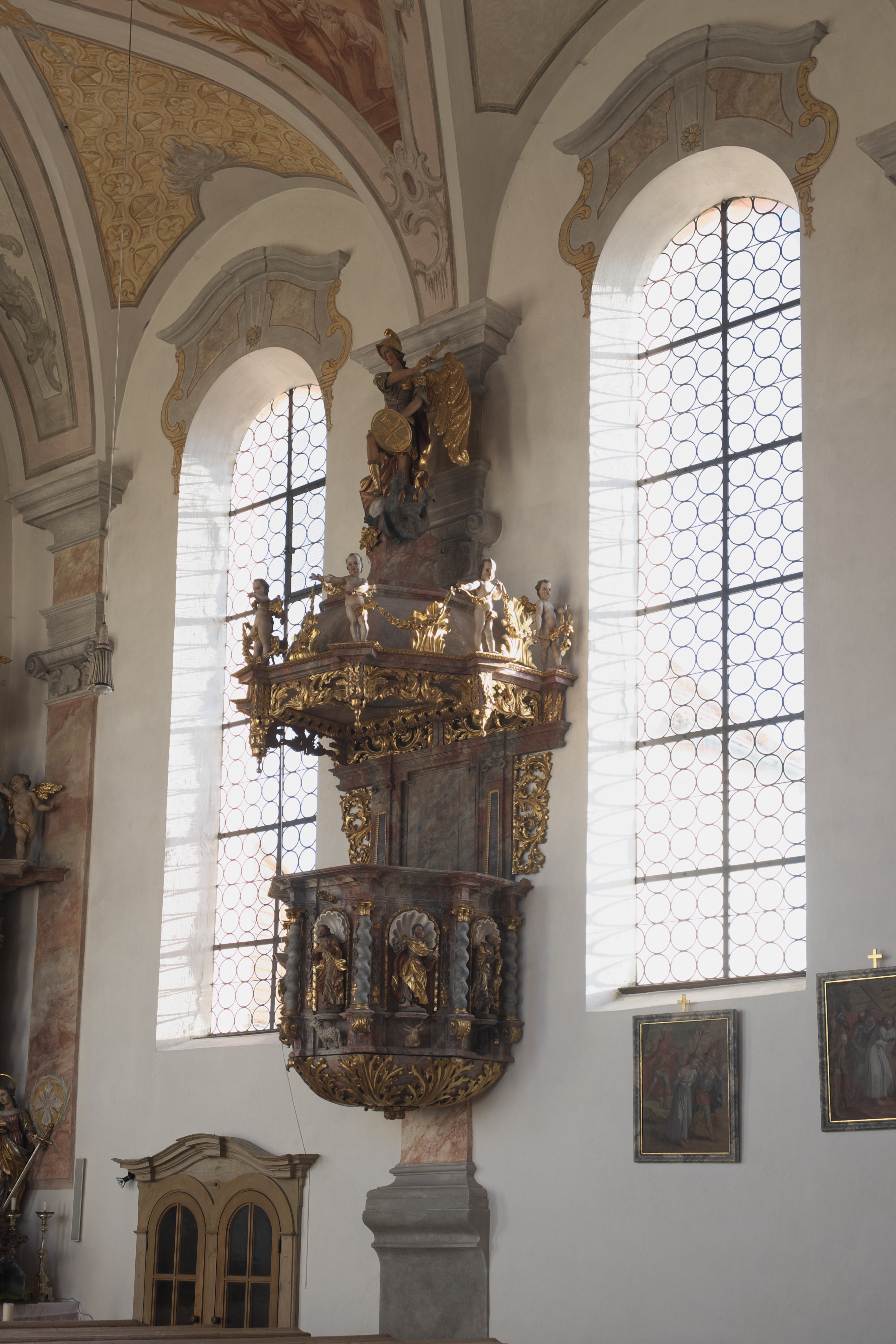 Katholische Pfarrkirche St. Stephan in Burggen im oberbayerischen Landkreis Weilheim-Schongau (Bayern/Deutschland), Kanzel um 1700